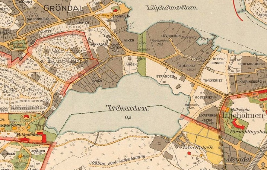 1934 års karta över Stockholm med omgivningar Detaljerad karta över Stockholm med omnejd. Upprättad mellan 1917 och 1934